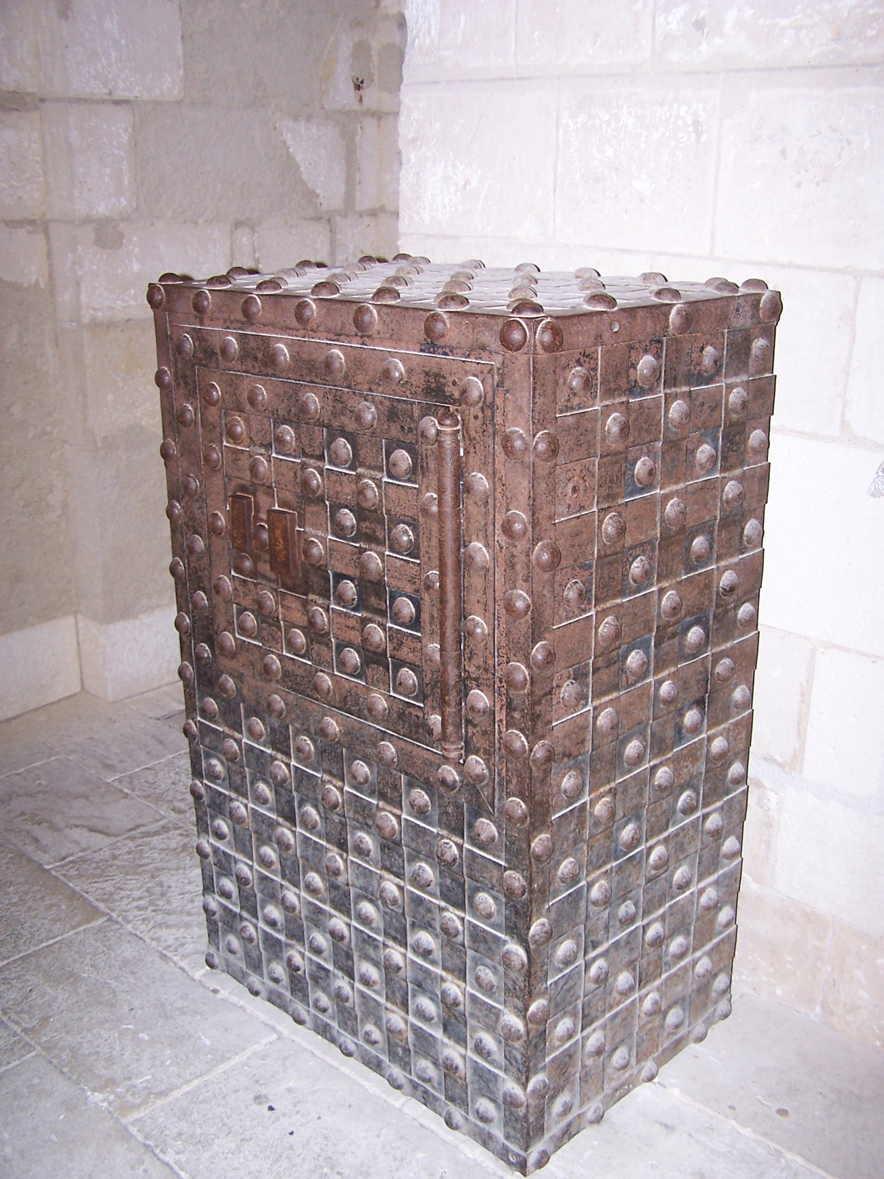 Photographie d'un coffre du XVIIème siècle. Ce coffre appartenait à un capitaine de la tour Saint-Nicolas, l'une des deux tours emblématiques du Vieux-Port de La Rochelle.